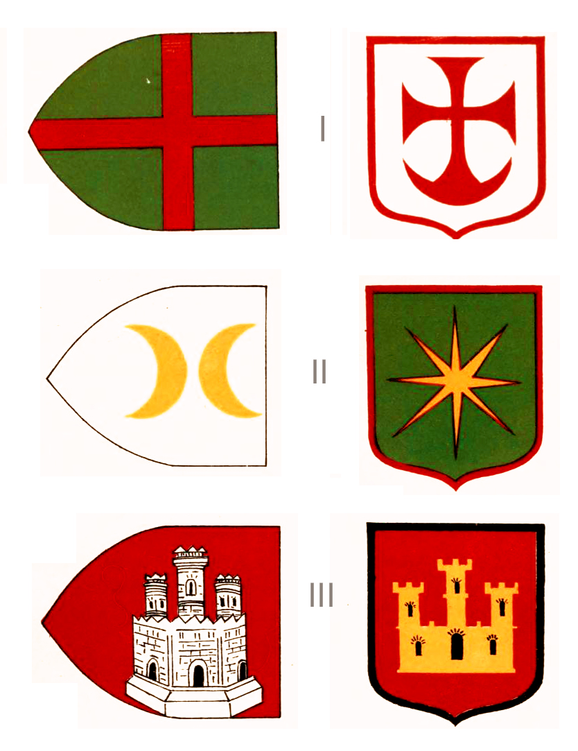 Герби Русі: Книга знань про всі королівства, землі й володіння, що є у світі; табилця 19